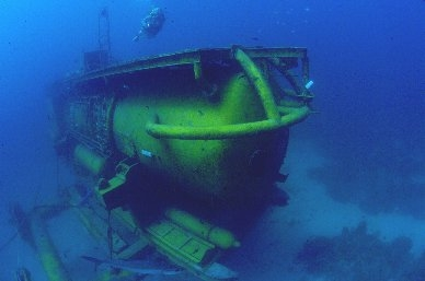 Labor Aquarius